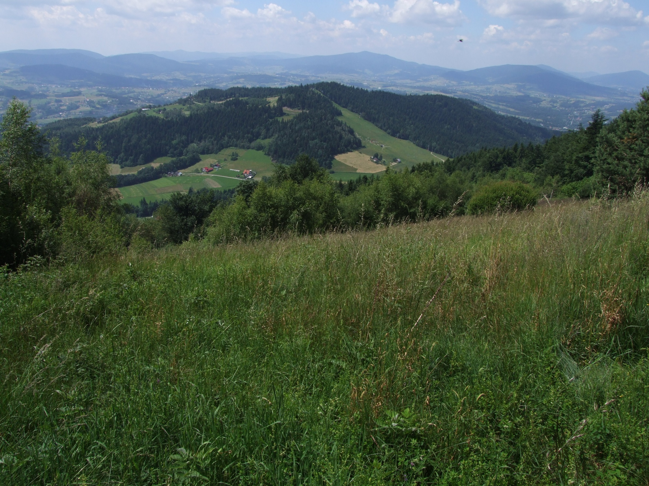 Polana Stoły na Sałaszu Zachodnim i widok na południową stronę (w dole widoczna Łysa Góra, w oddali inne wzniesienia Beskidu Wyspowego)